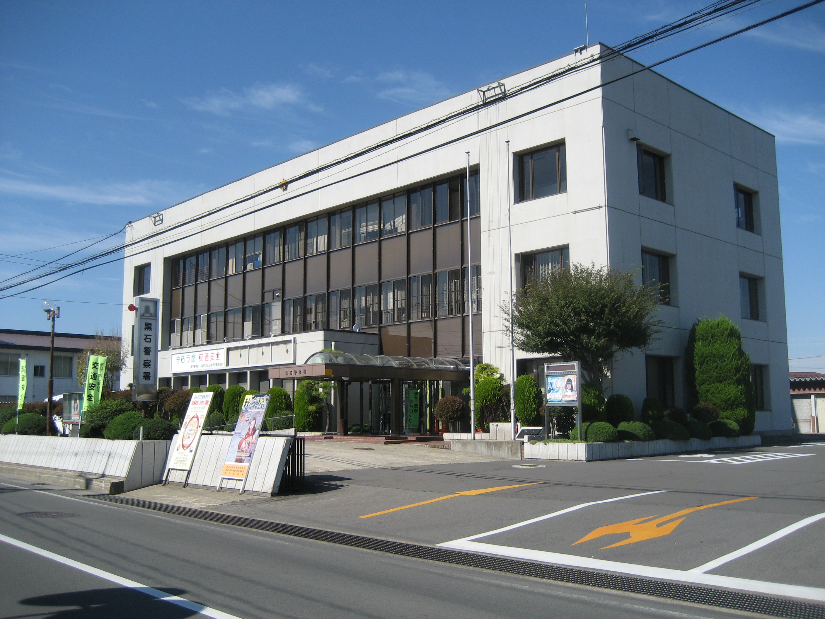 黒石警察署庁舎